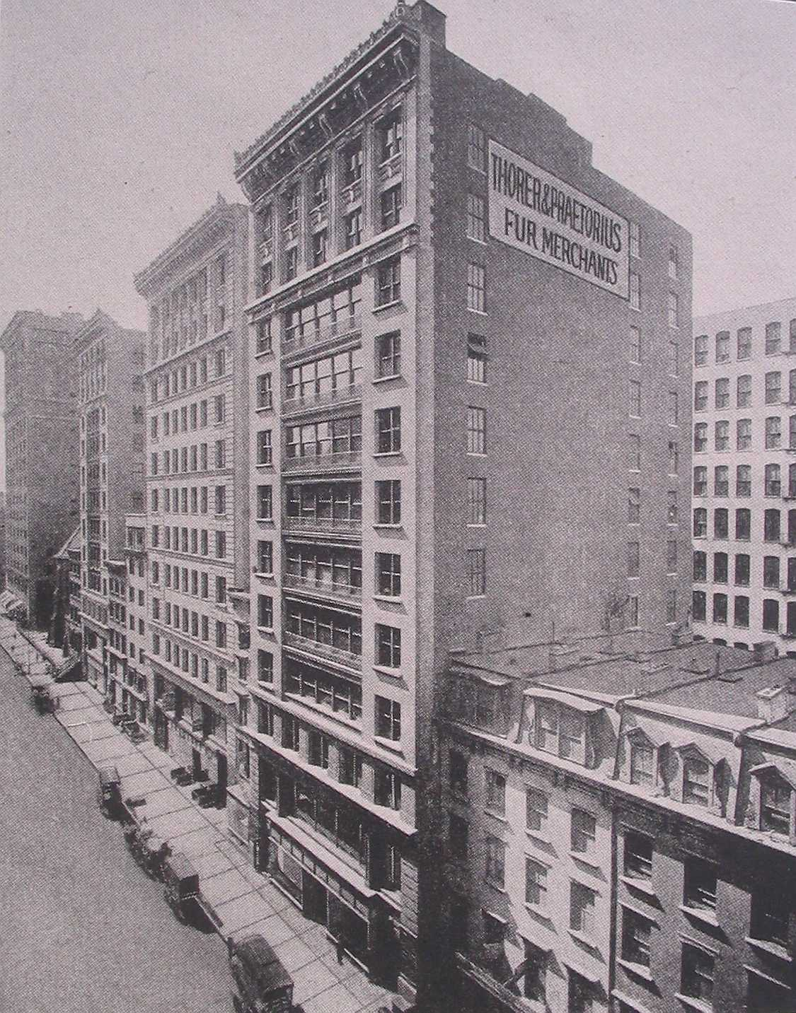 300 Jahre Familie Thorer - 50 Jahre Theodor Thorer. Seite 41. New Yorker Geschäftshaus.